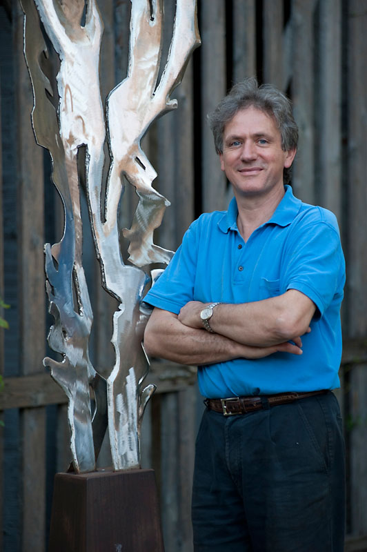 Marco Di Piazza accanto a una sua scultura in acciaio.